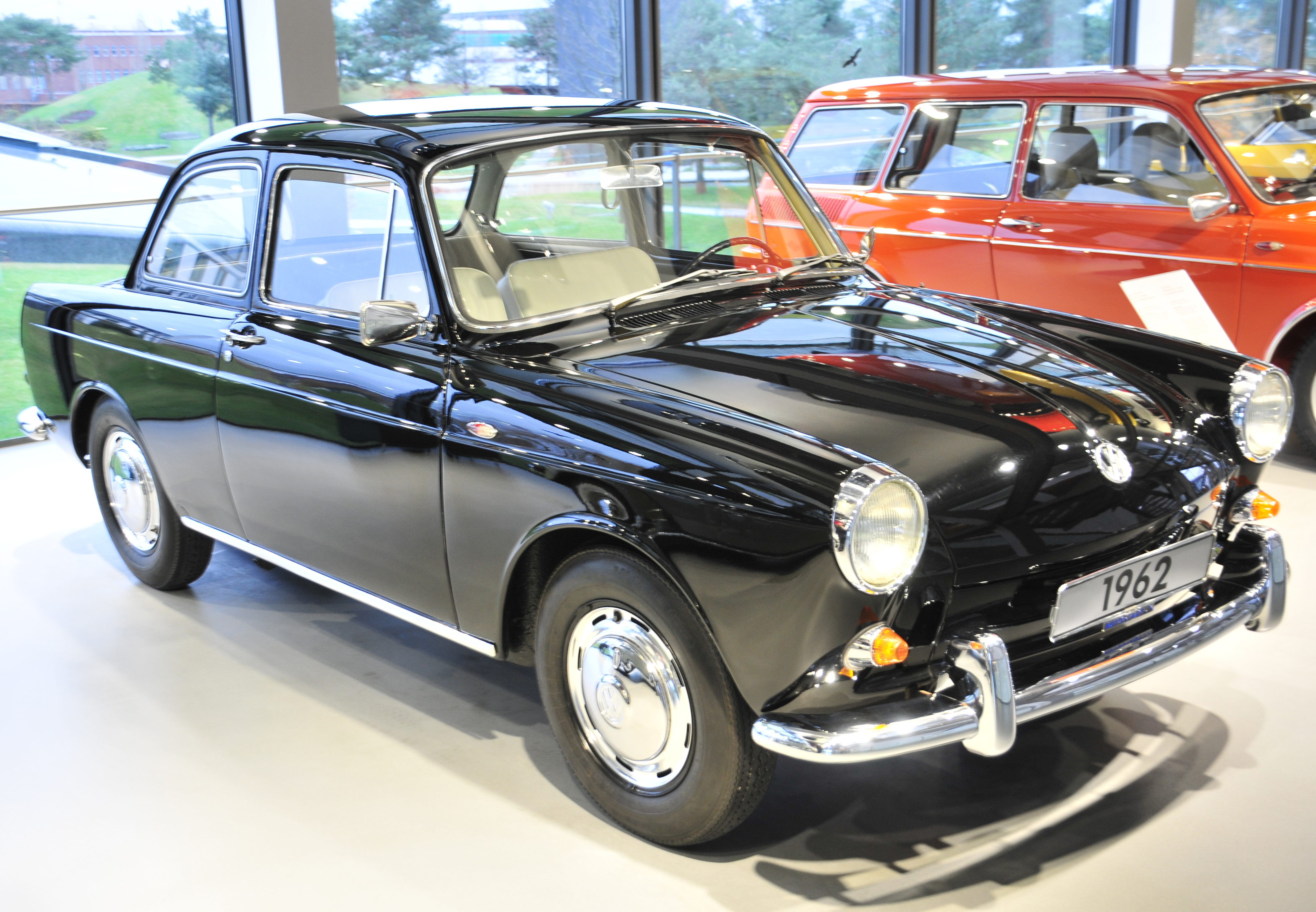 Fahrzeug in der Autostadt Wolfsburg